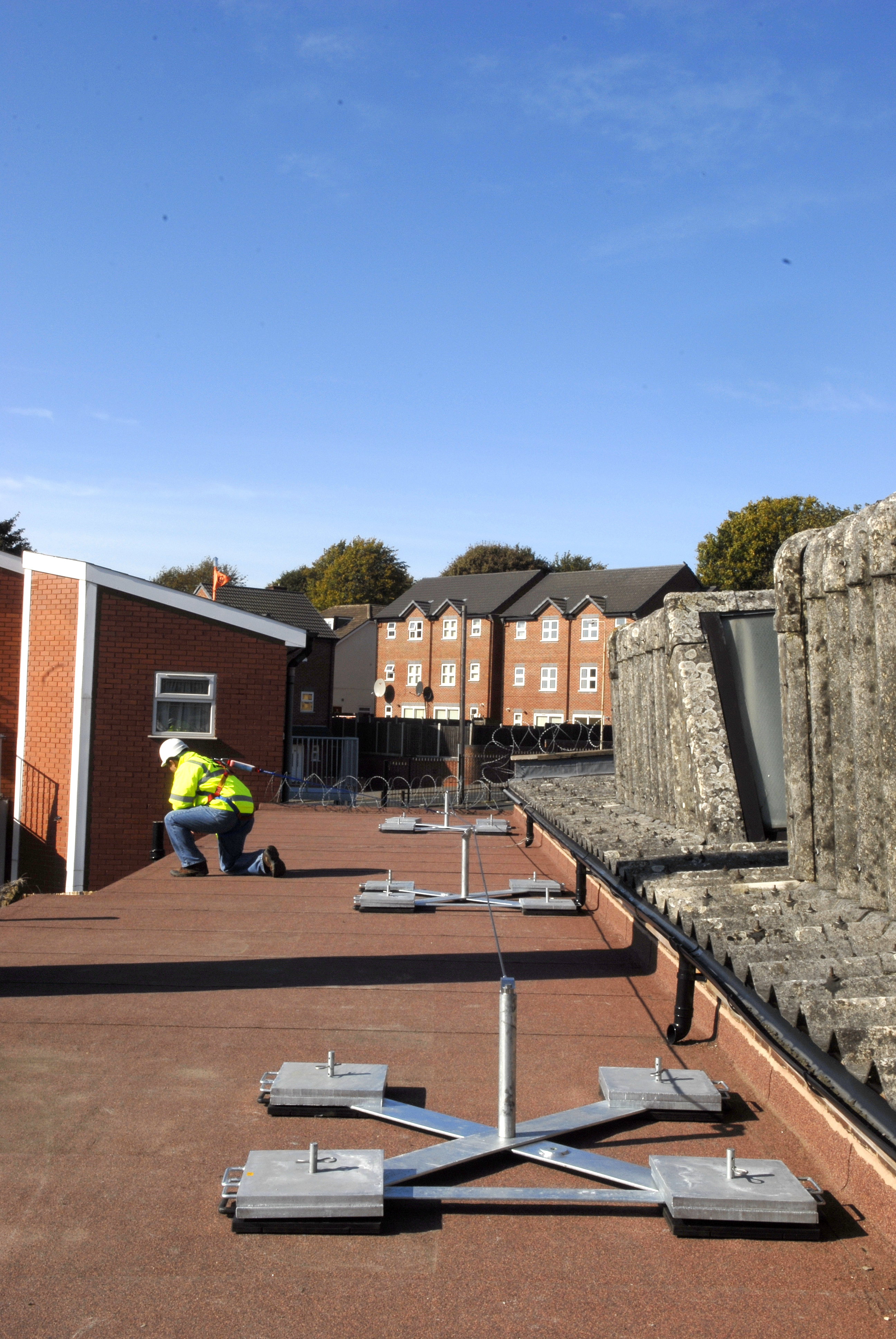 WireAnka est une ligne de vie autoportante de KeeSafety SAS